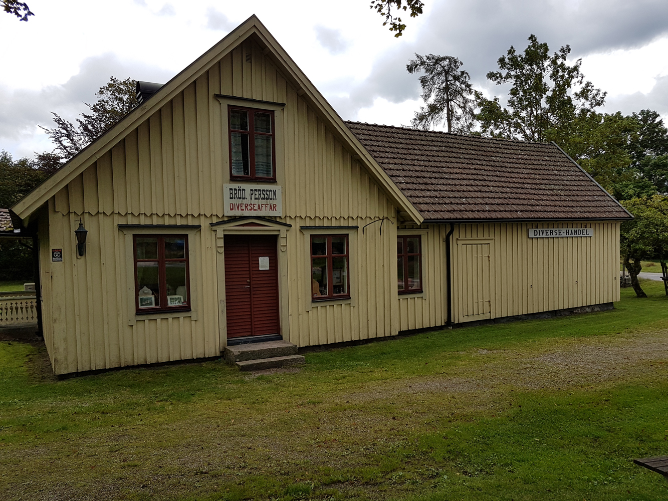 Gamla lanthandeln "Lyckebo" (också benämnd Bröd. Perssons diverseaffär) i Simlångsdalen, som sedan 1984 tillhör Breareds kulturhistoriska förening.